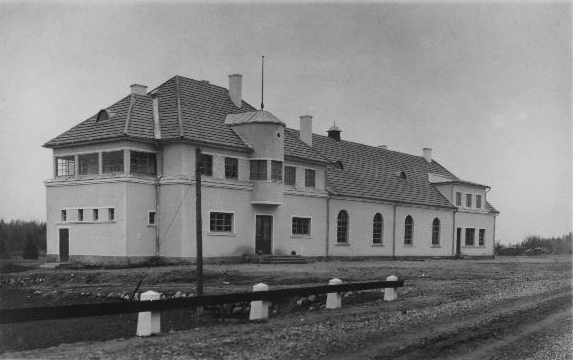 Народный дом - дом туристов в Хаанья, Эстония. Архитектор Николай Кузьмин, 1937 год